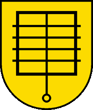 Wappen von Villars-le-Grand Kanton Waadt Schweiz